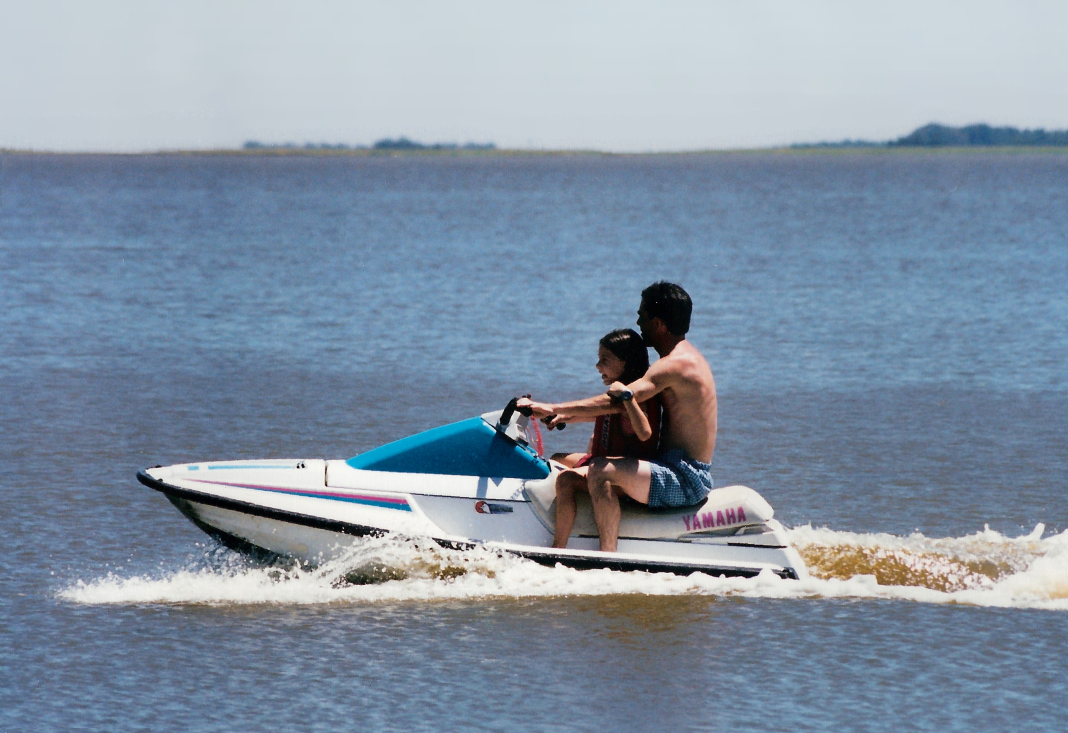 Moto de agua en el Parque Natural Laguna de Gómez, en Junín, Argentina.